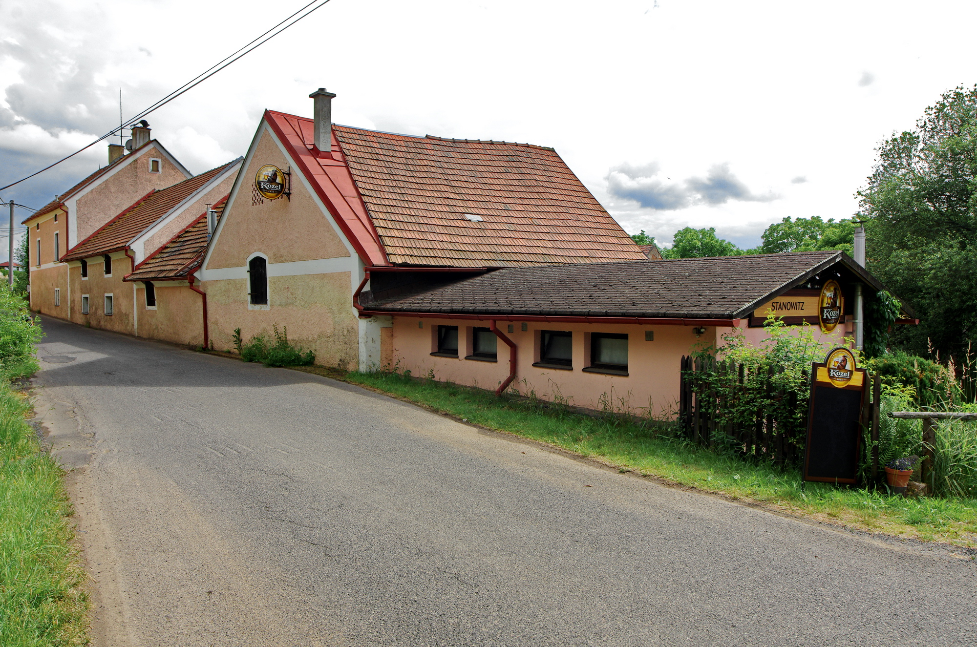 Stanoviště (část Mariánských Lázní), okraj osady, okres Cheb